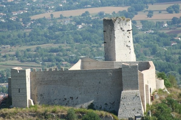 Veduta della Rocca Janula oggi, a seguito del restauro.